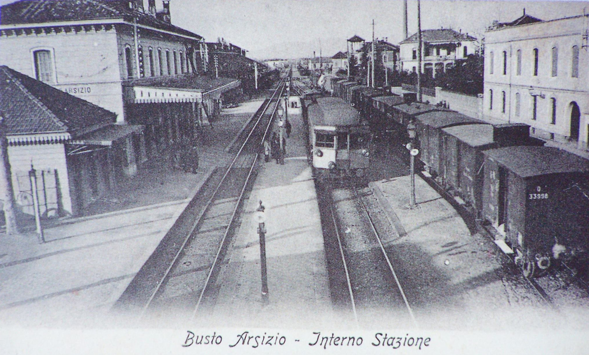 La vecchia stazione ferroviaria di Busto Arsizio.